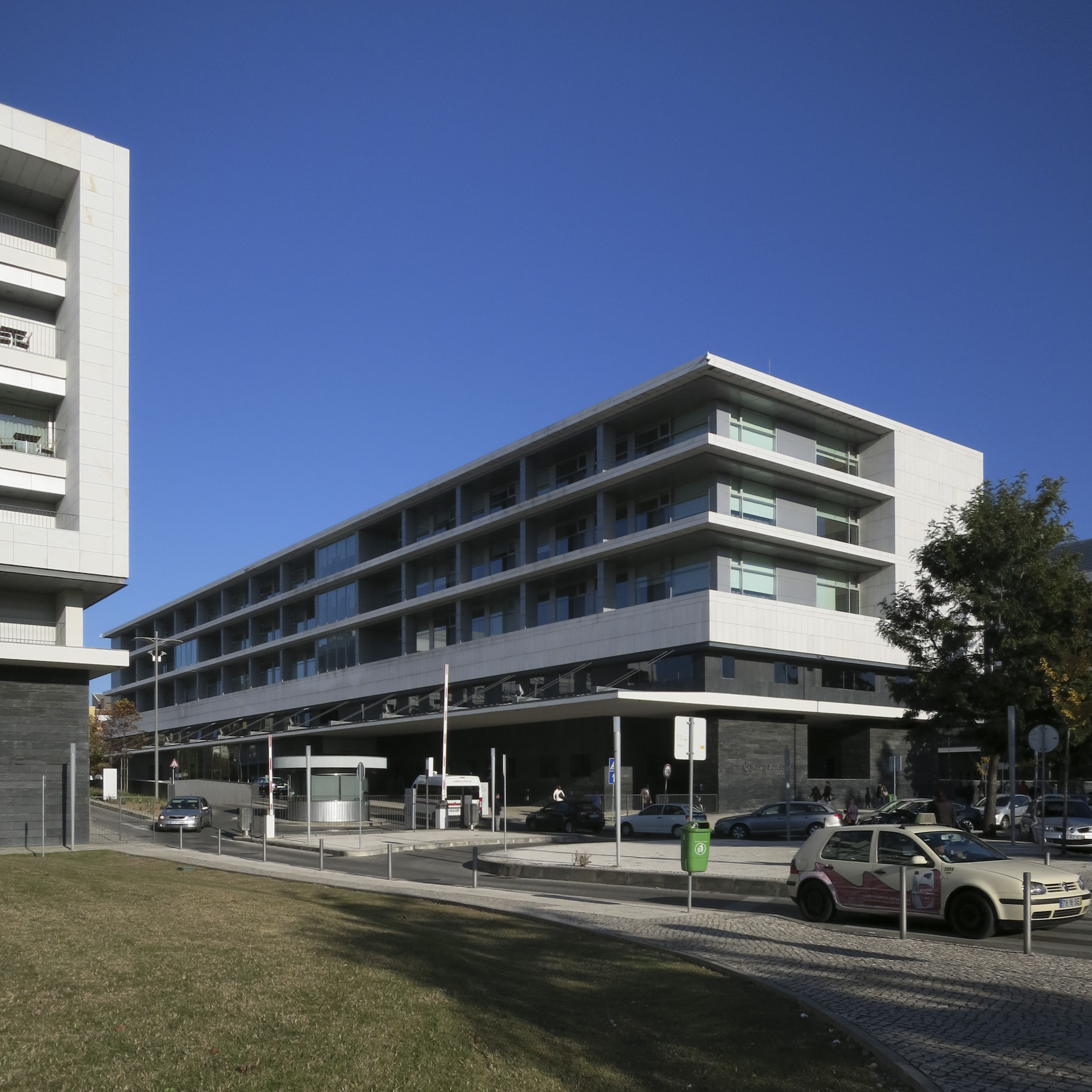 Manuel Salgado, Hospital da Luz, Complexo Integrado de Saúde da Luz, Lisboa